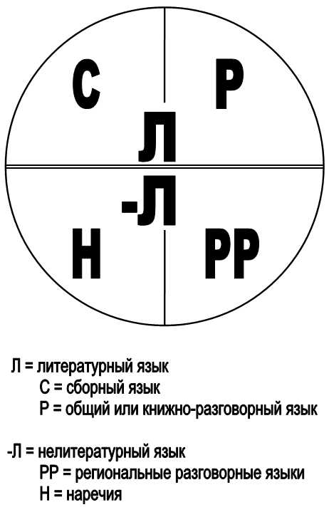 Graph "socjalne vrsti slovenskega jezika" (ru)